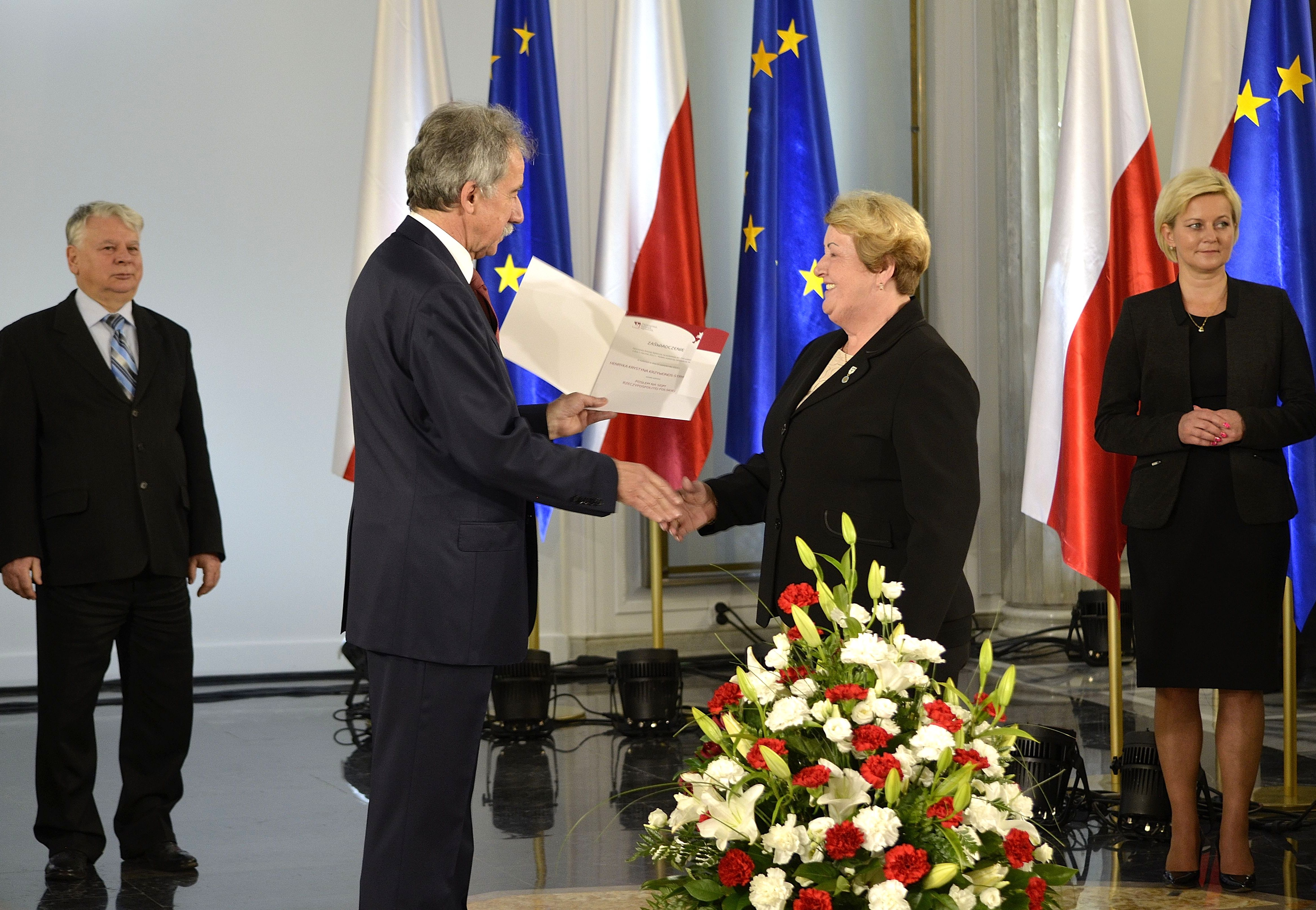 Posłanka Henryka Krzywonos podczas uroczystości wręczenia zaświadczeń o wyborze nowo wybranym posłom w Sali Kolumnowej Sejmu